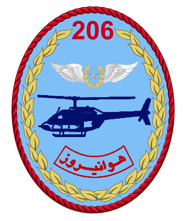 خلبان هلیکوپتر بل-٢٠٦ هوانیروز ارتش